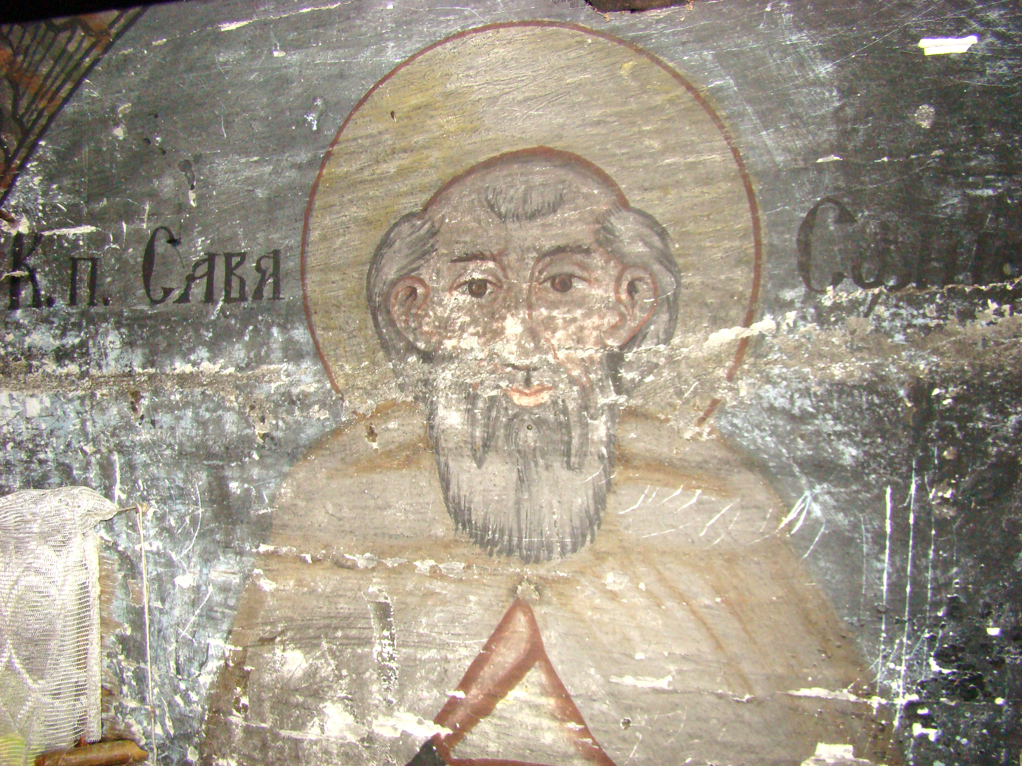 Biserica de lemn din Răstolțu Deșert, comuna Agrij, județul Sălaj